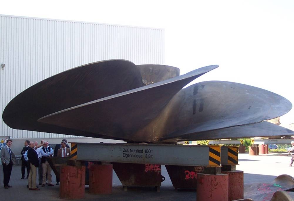 Schiffspropeller